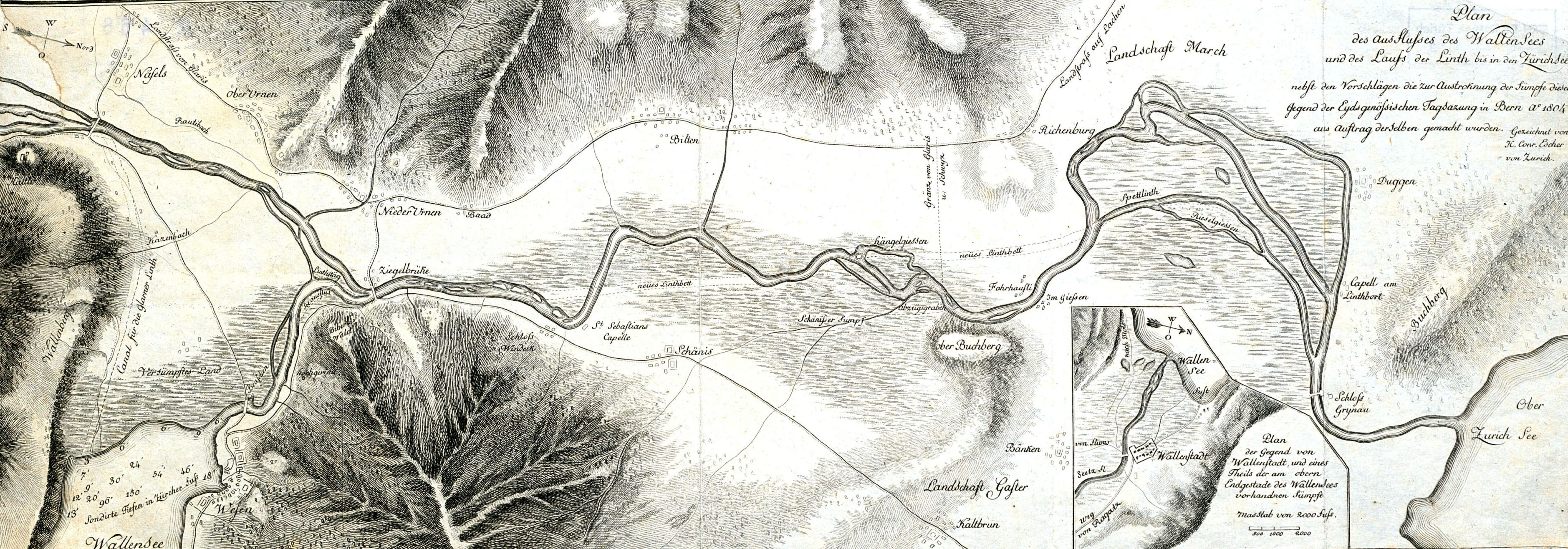 "Plan des Wallen Sees und des Laufs der Linth bis in den Zürich See, 1804". Vorschlag von Hans Conrad Escher an die eidgenössische Tagsatzung zur Korrektion des Flusses Linth.